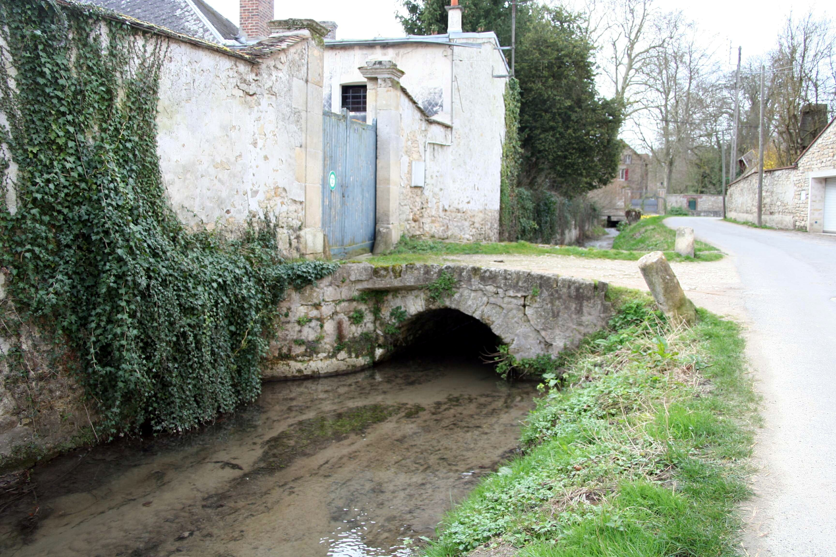 ruisseau La Montcient à Brueil-en-Vexin - Yvelines (France)